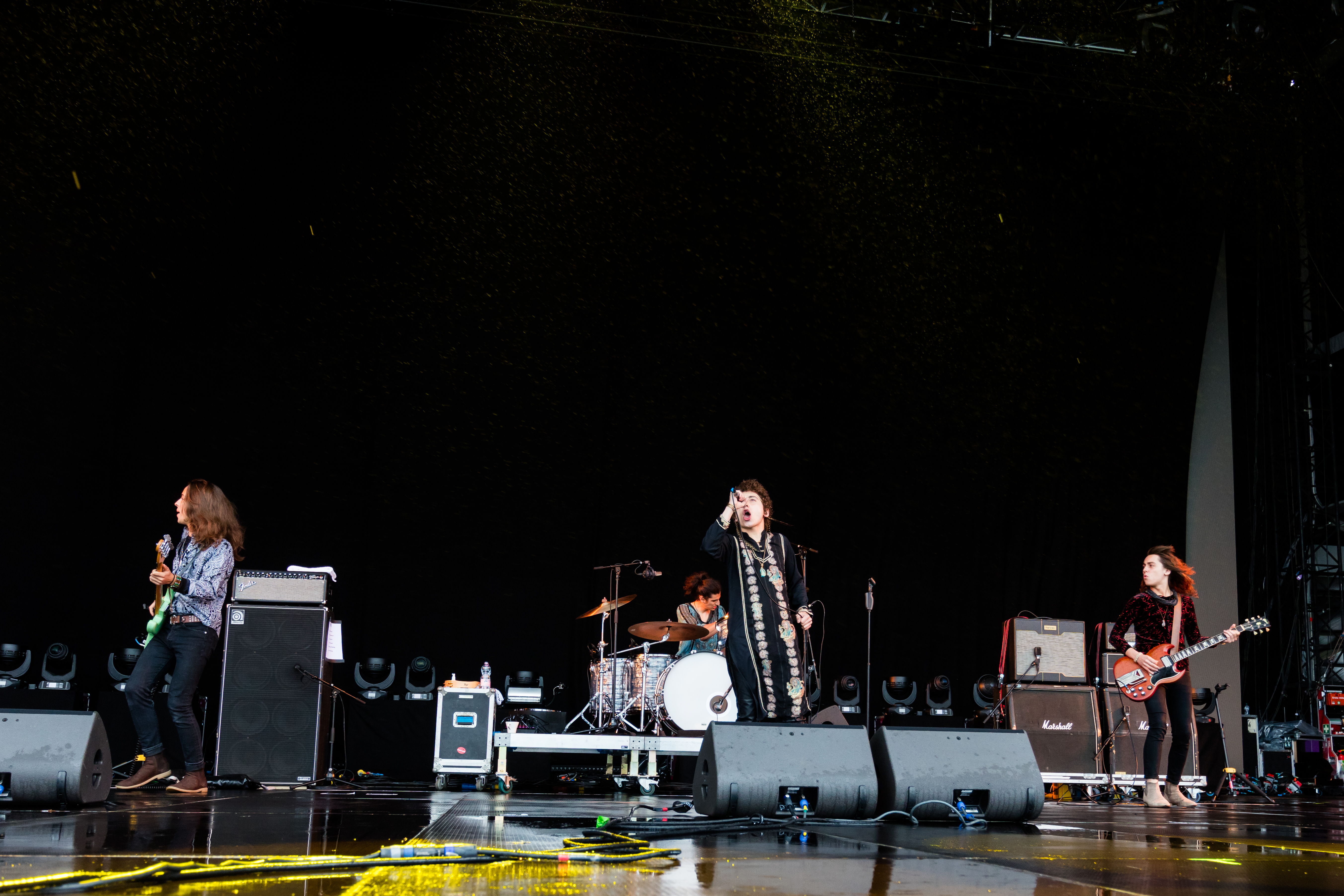 Greta van Fleet @ Rock am Ring 2018